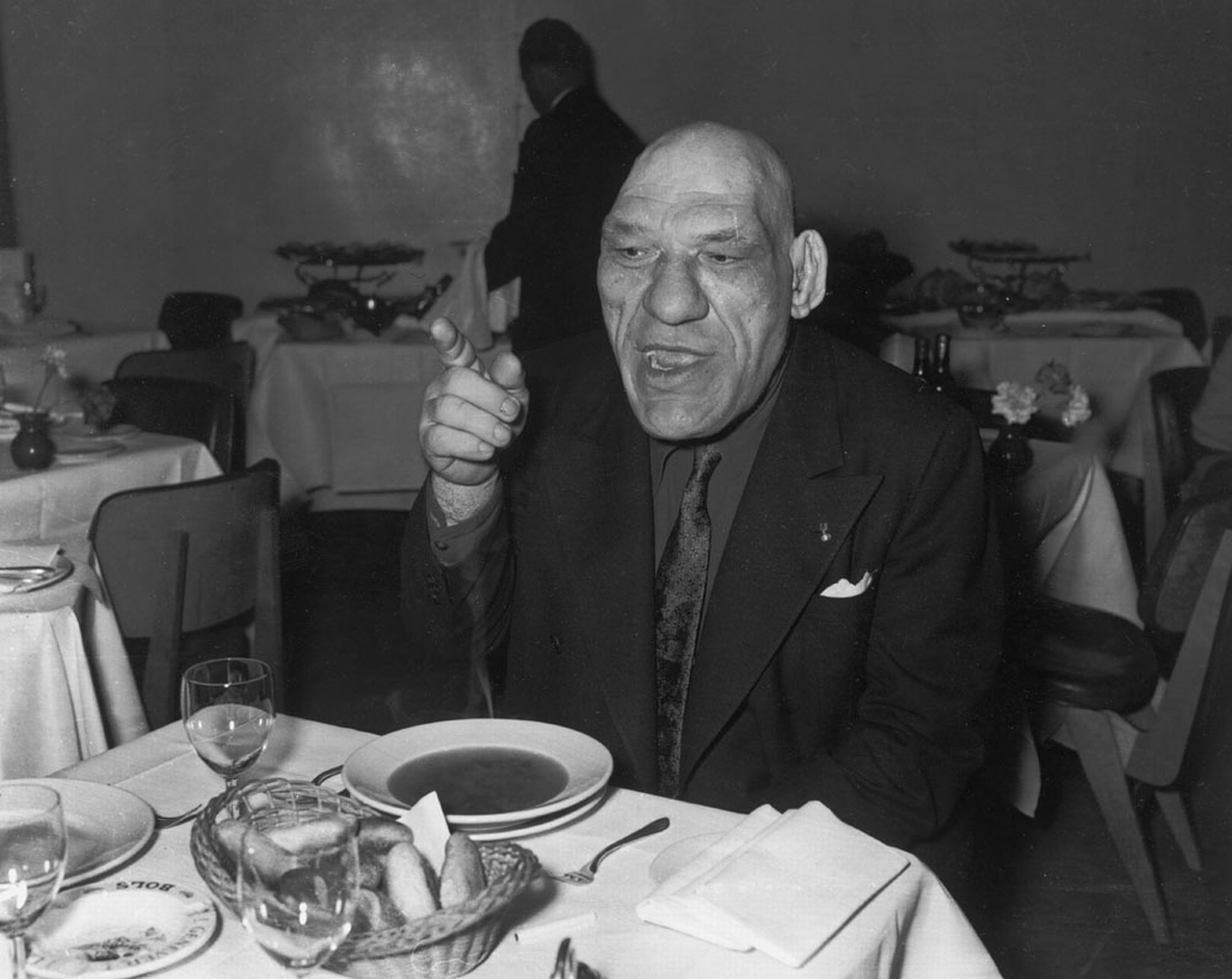 Oud-wereldkampioen (1942) worstelen, de Russisch-Frans-Amerikaanse, 276 pond wegende, Maurice Tillet achter een bordje soep op doorreis naar Singapore, Schiphol, 26 januari 1953 Foto Ben van Meerendonk / AHF, collectie IISG, Amsterdam